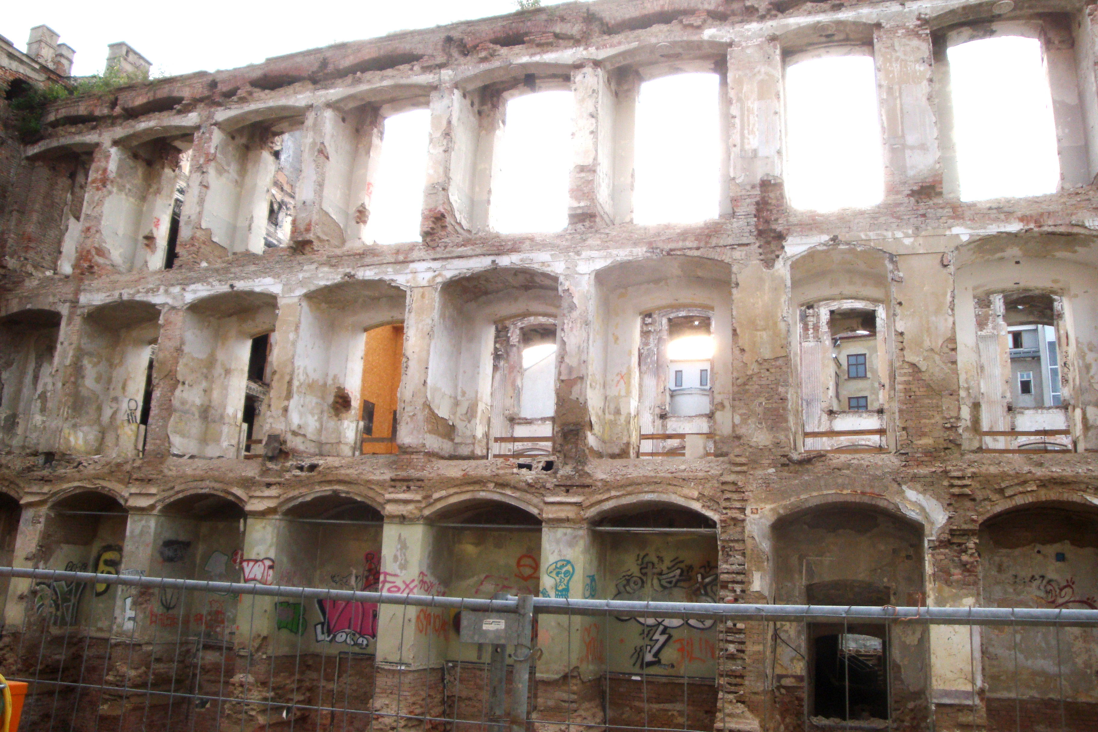 Sophiensäle, ehem. Sophienbad